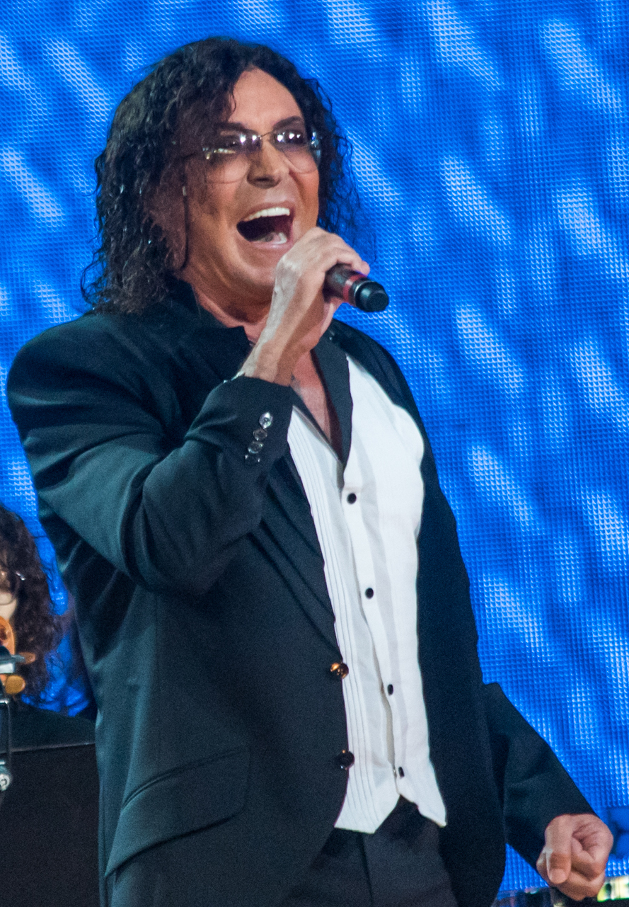 Валерий Леонтьев на фестивале «Лайма. Рандеву. Юрмала 2017»